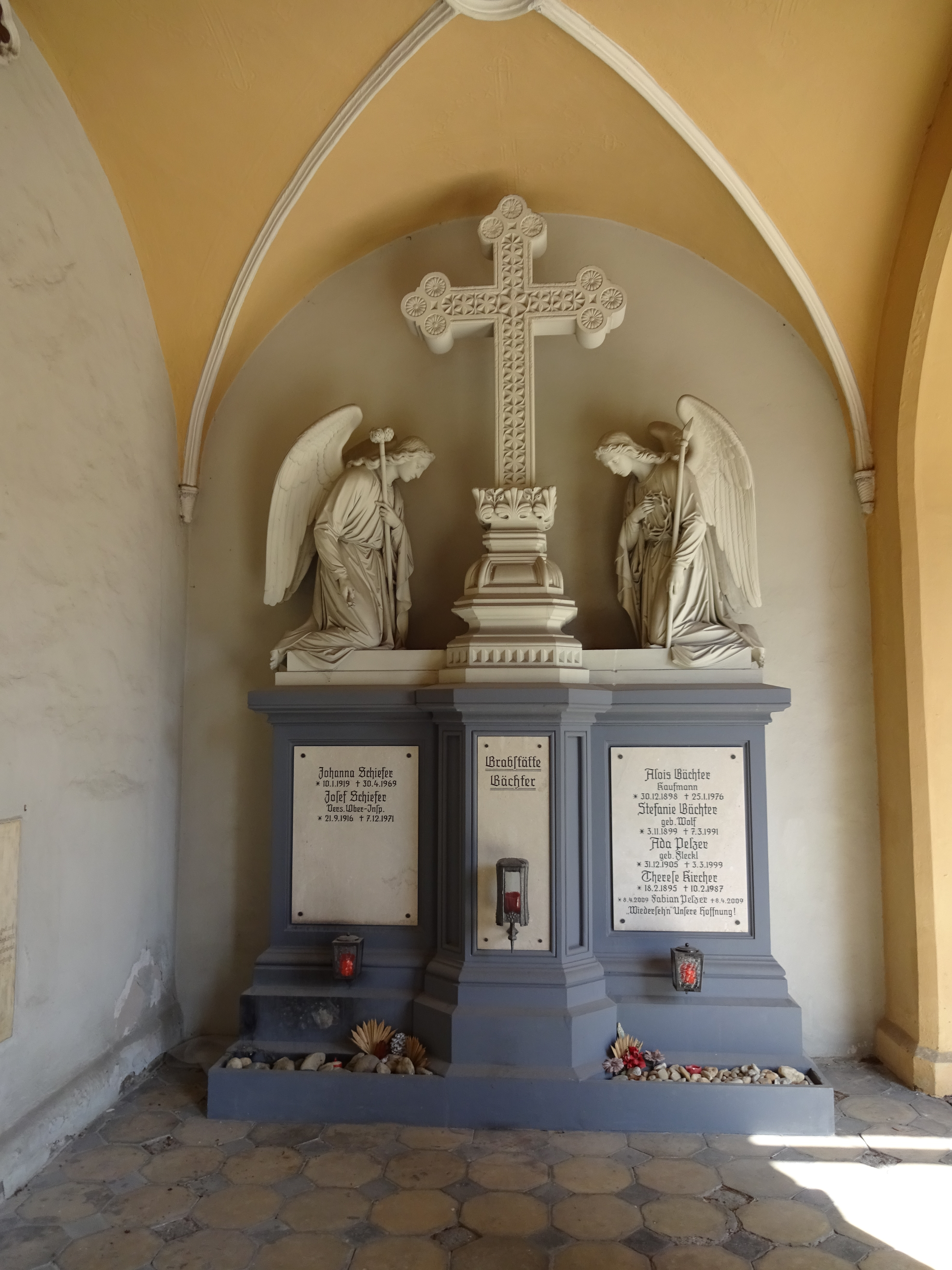 Westfriedhof Innsbruck, Grabstätte Gächter (vormals Bandeson) in den Nordarkaden des nördlichen Teils, Zwei Engel beiderseits eines Kreuzes von Serafin Eberhart, 1878